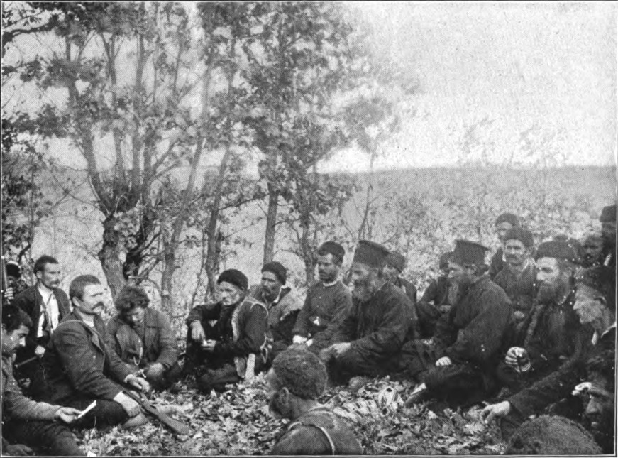 Четата на Христо Чернопеев със селяни.